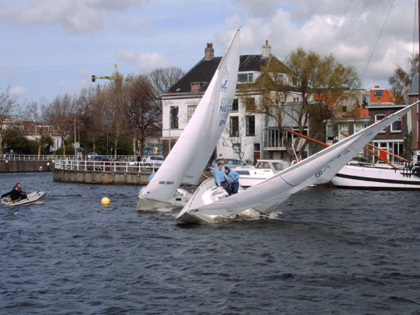 Kolk evenement 2004, jaarlijks terugkerende matchrace georaniseerd door D.S.W.Z. Broach. Eigen werk.